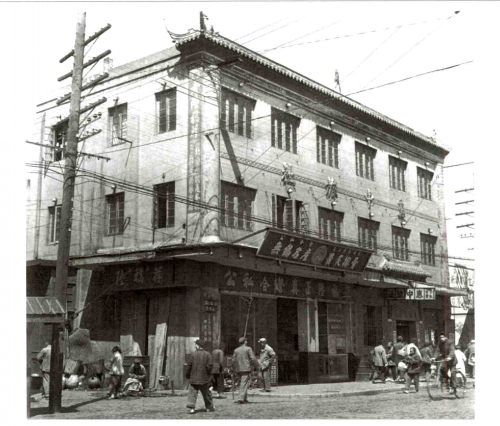 1959年，位于无锡市通运路的无锡真正老陆稿荐